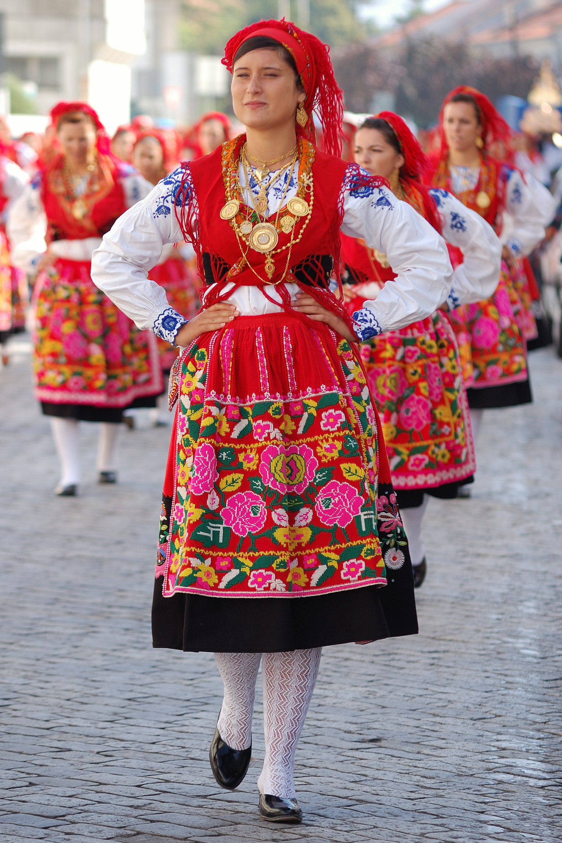 Viana do Castelo, Portugal [2010]